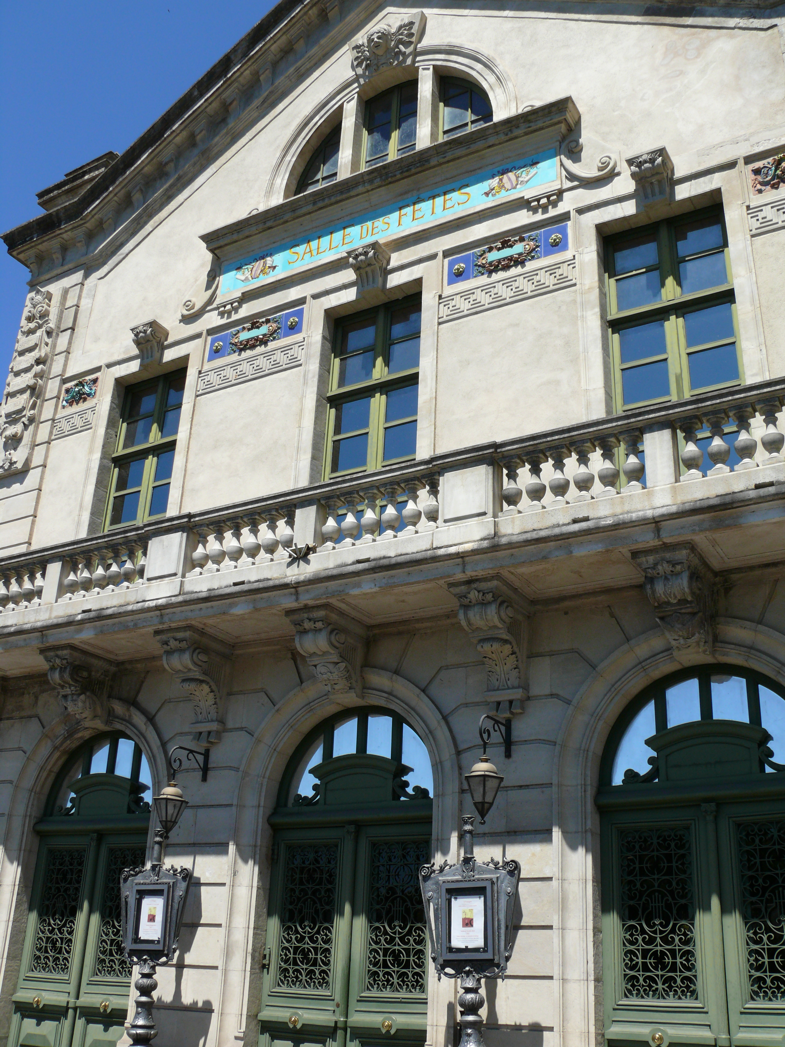 Villefranche-de-Rouergue - Théâtre municipale, salle des Fêtes